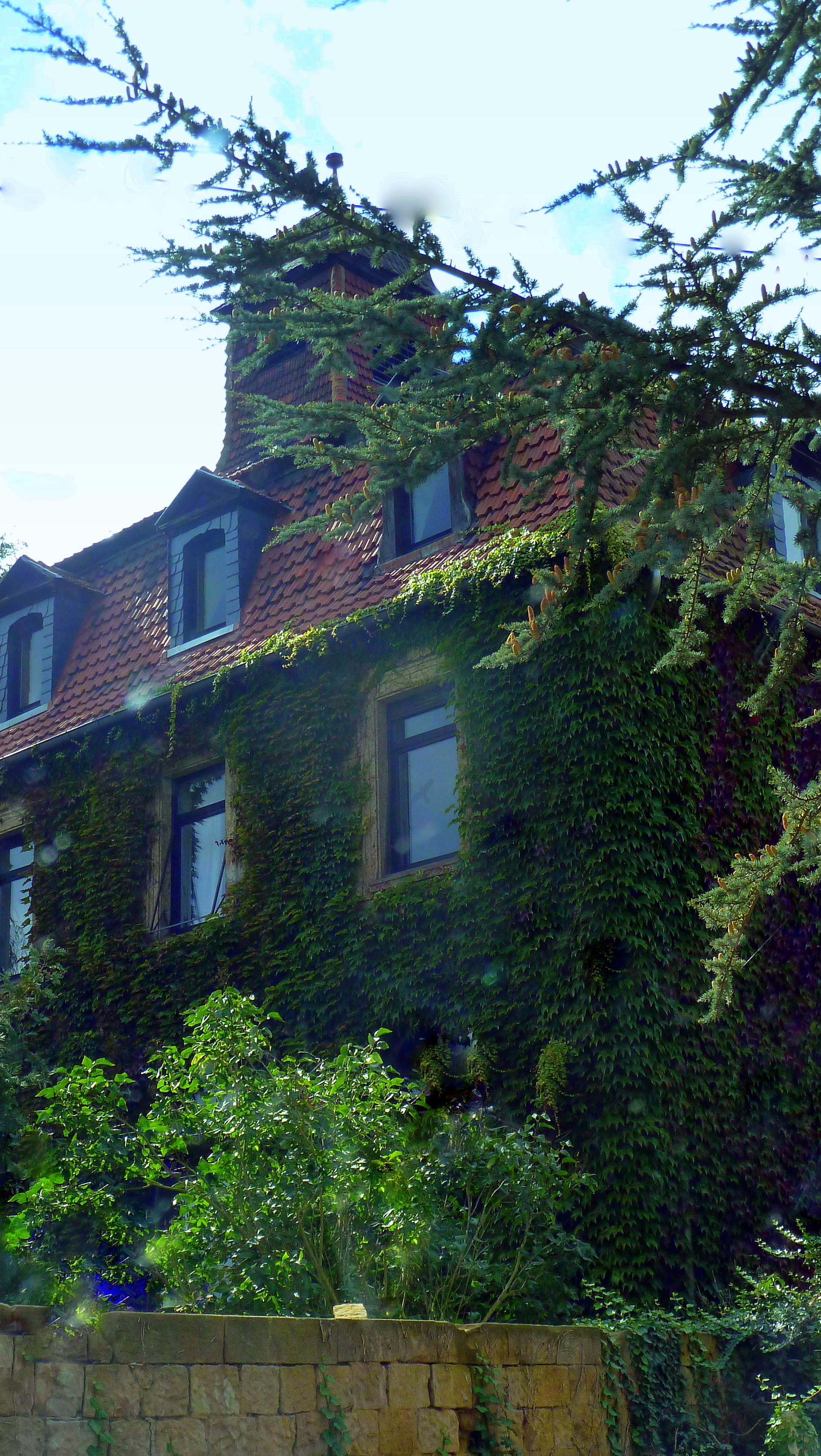 Grünes Haus in Oberhausen an der Appel